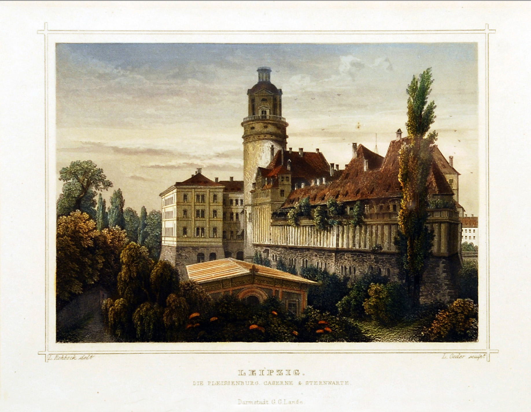 Rohbock, Ludwig: Die Pleißenburg Leipzig. Kaserne und Sternwarte. Kolorierter Stahlstich 14,8 x 19,5 cm